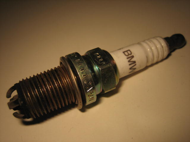 bougie d'allumage